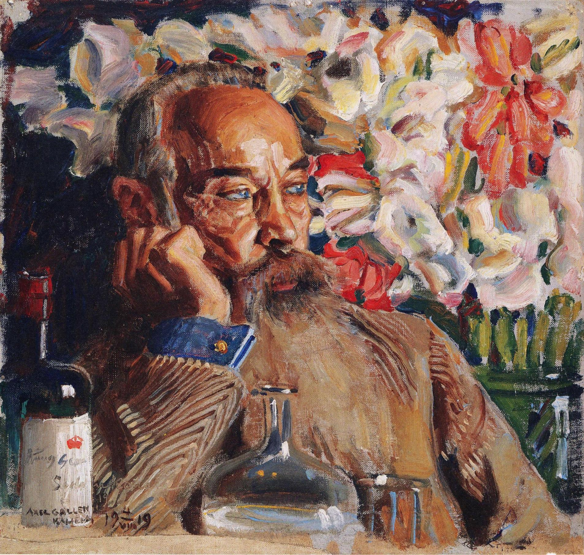 Akseli Gallen-Kallelan maalaama muotokuva Sigurd Wettenhovi-Aspasta.